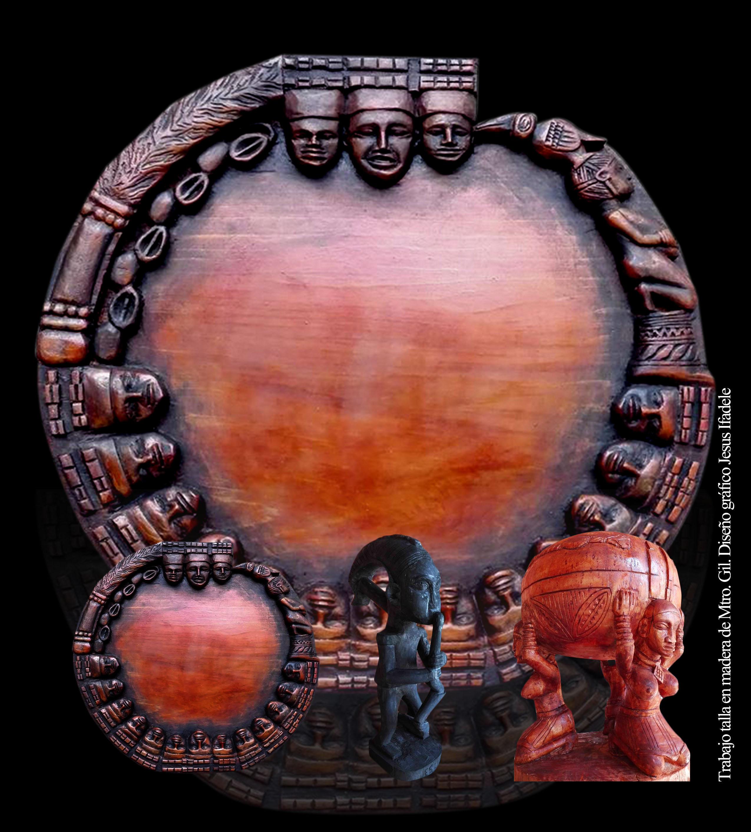 Opón Ifá, Esú y Ajére IFA, herramientas de adivinacion, deidad y contenedor de IFA. Talla Maetro GIL, Diseño Gráfico Jesús Ifadele